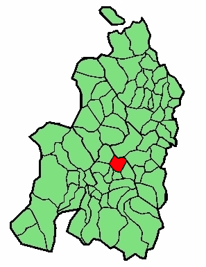 aipaturiko udalerriaren kokapena Nafarroa Beherean